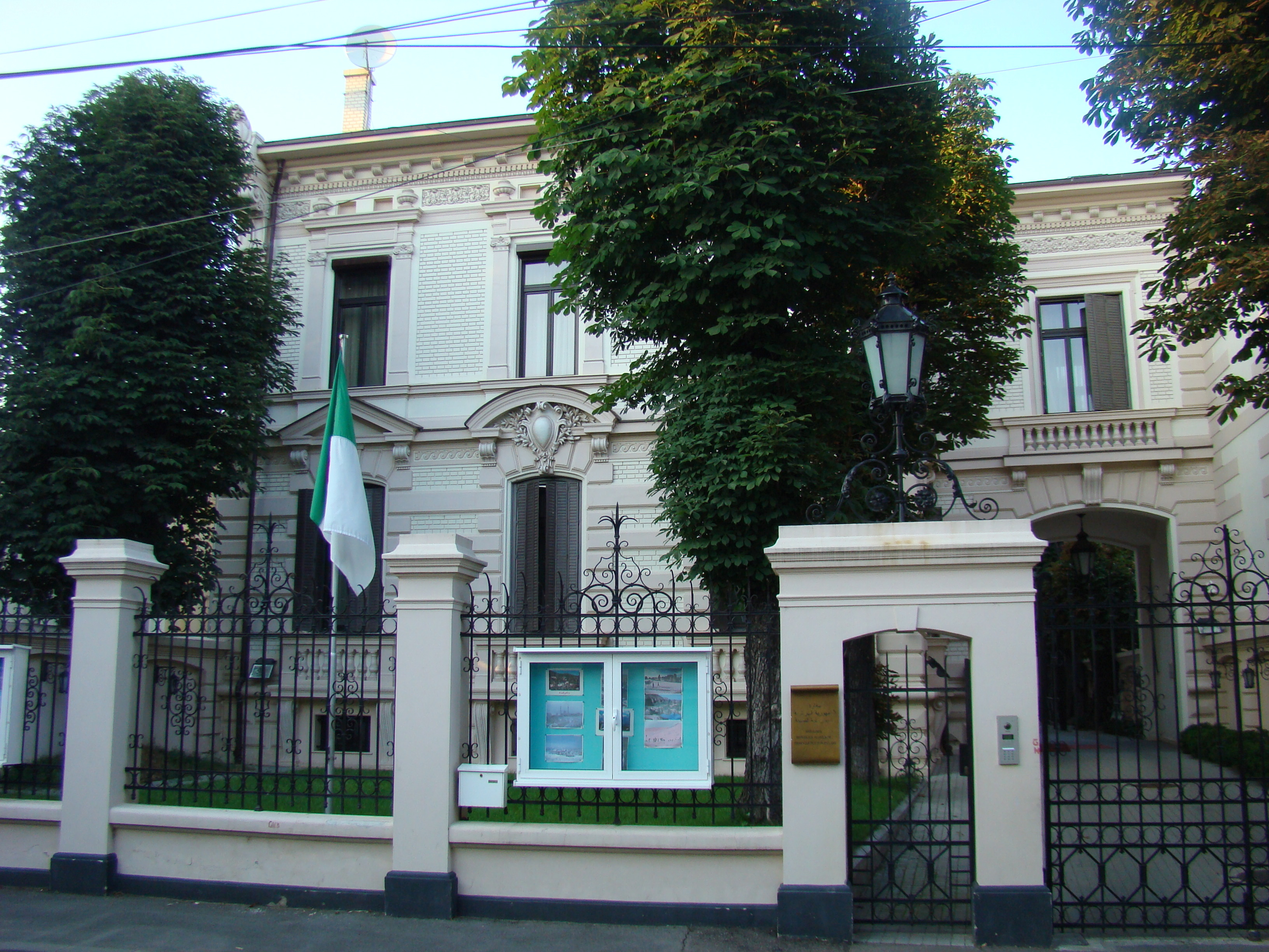 Casă monument istoric, str. Theodor Aman, nr.4 (în prezent Ambasada Algeriei)